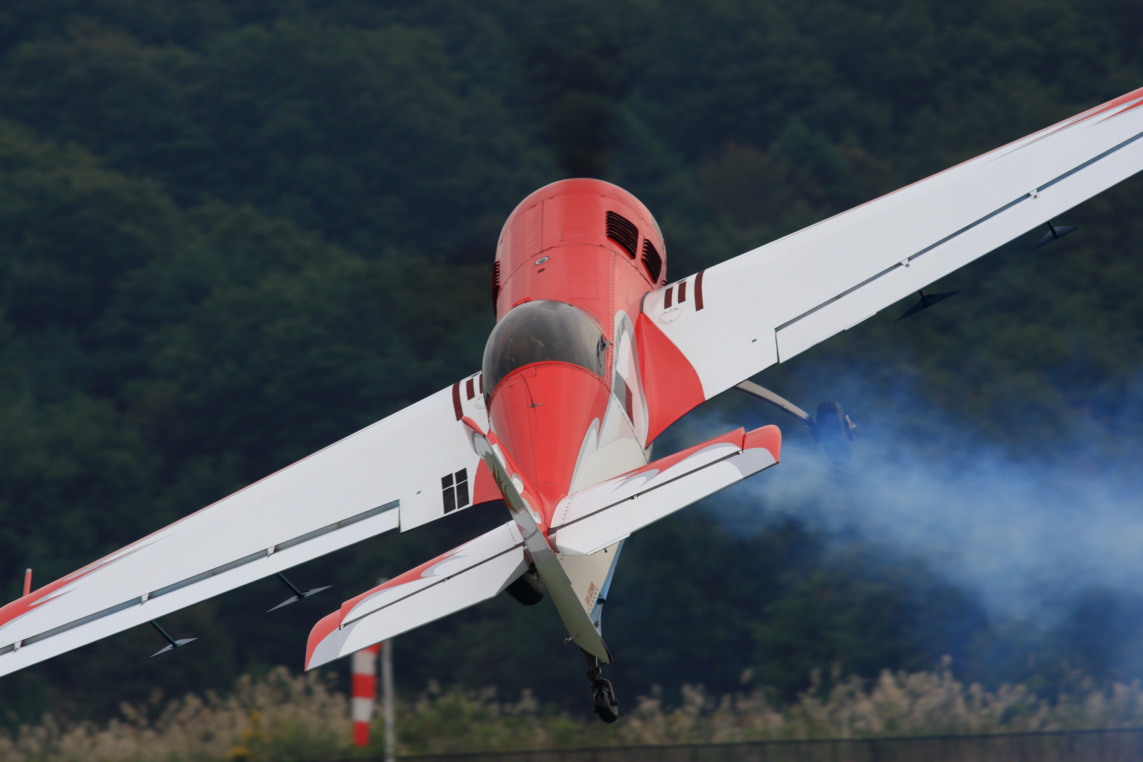 ふくしまスカイパークで行なわれた、ふくしまスカイアグリ りんご祭りでの、室屋義秀によるアクロバット飛行